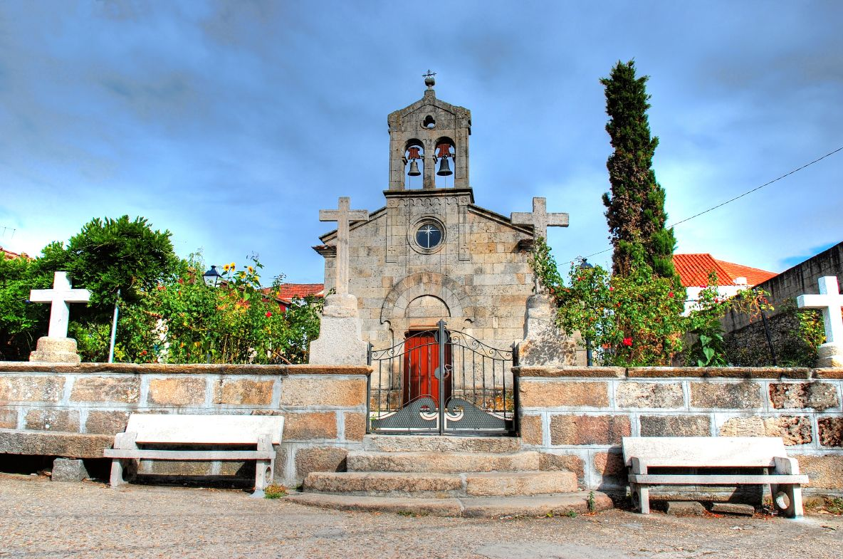 Parroquia de Santa María de Videferre